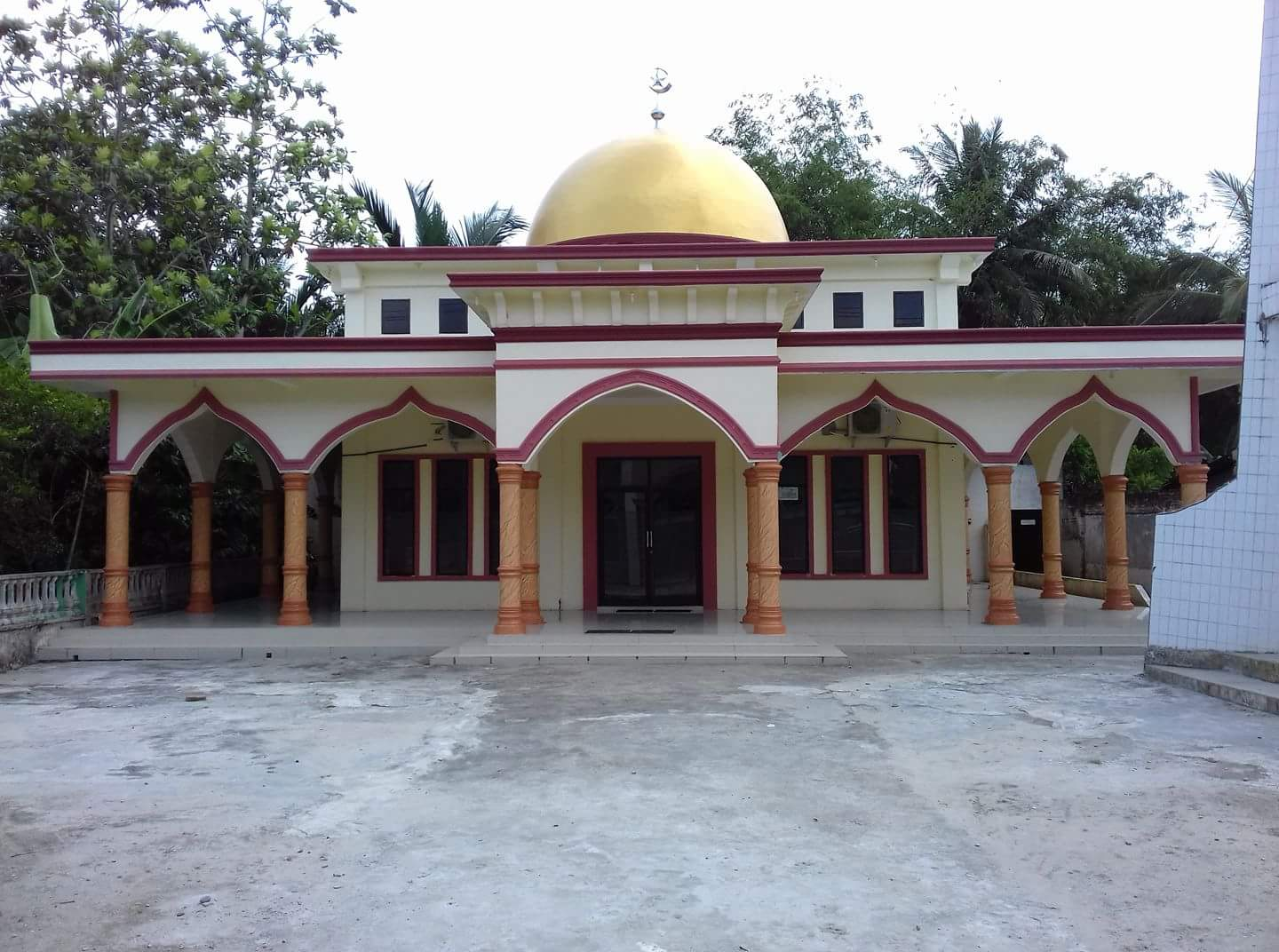 Mesjid MTQ 46 Pondok Bungur Tahun 2018